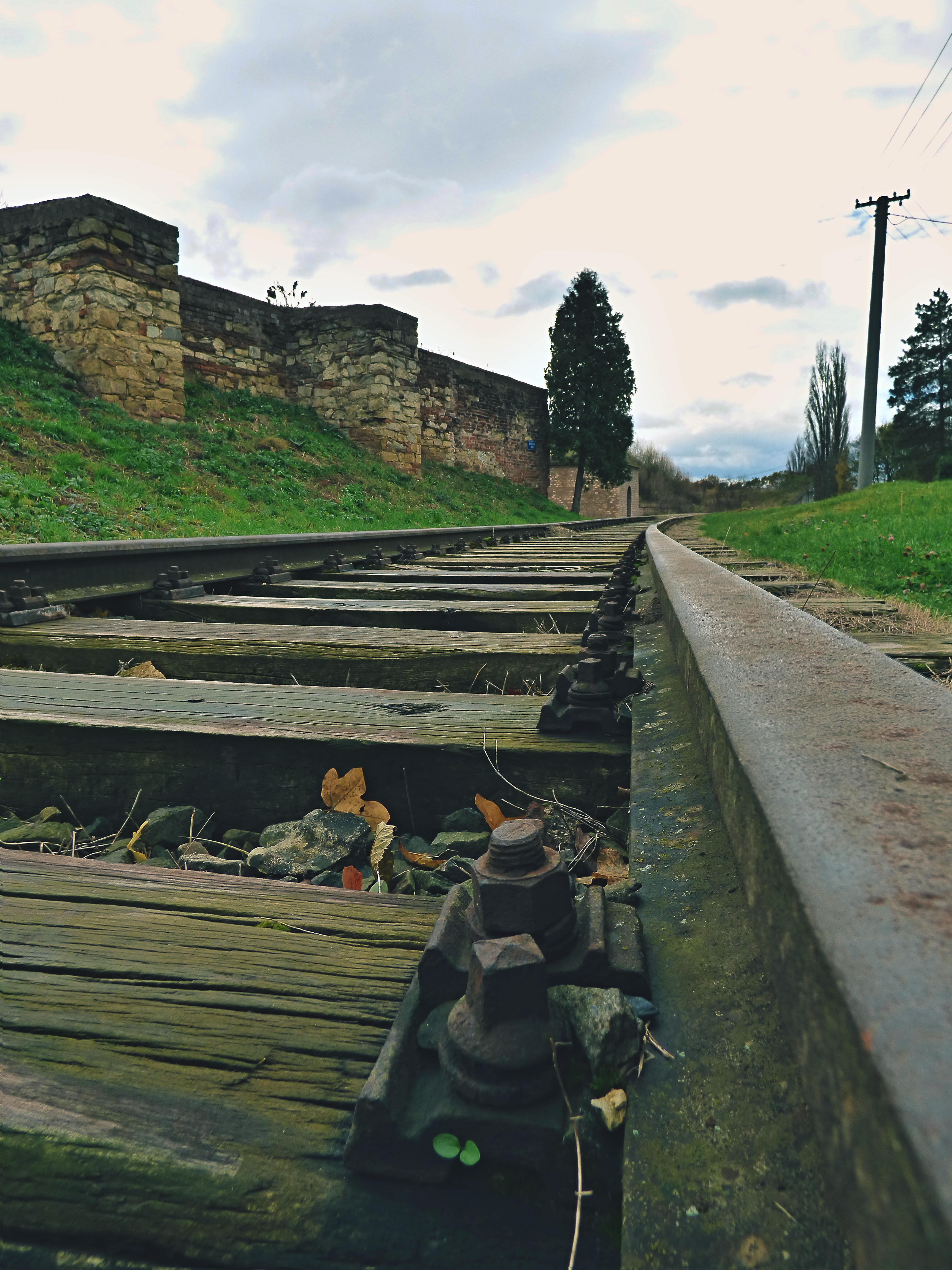 Blížíme ke konci bývalé vlečky.